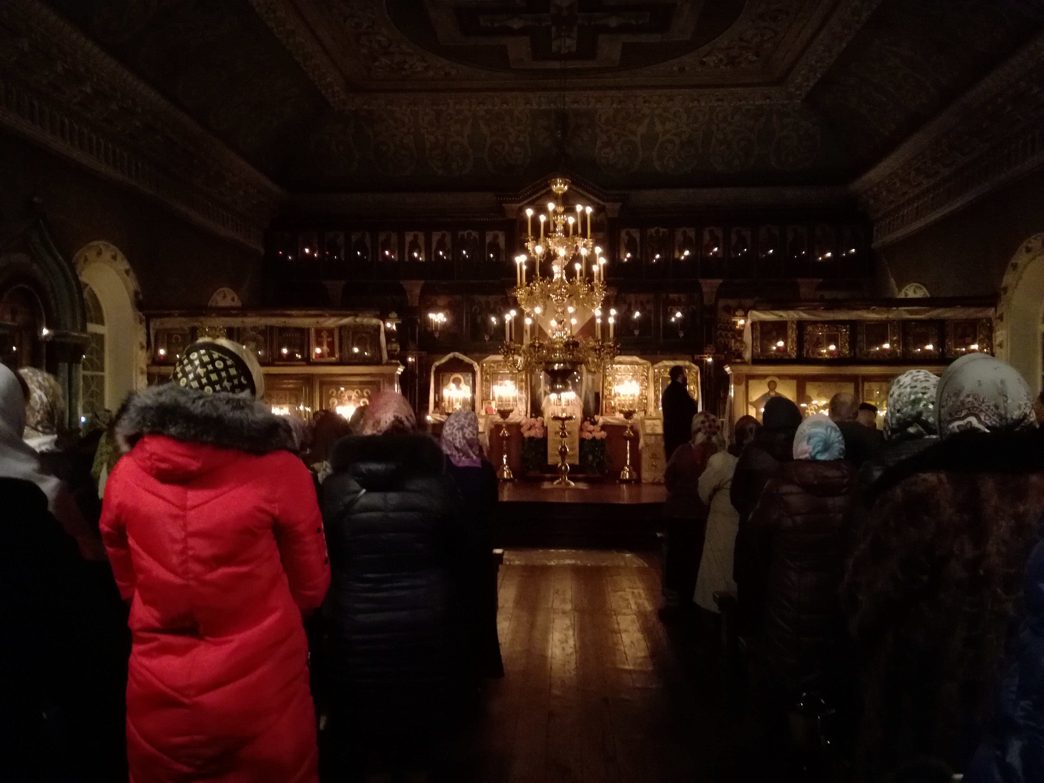 Vidus